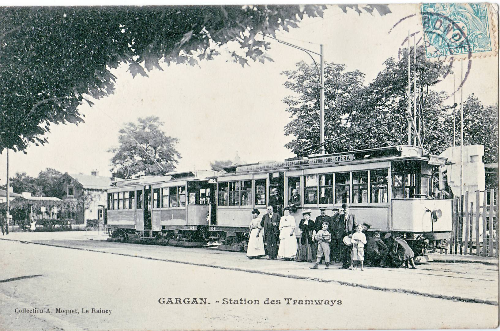 Carte postale ancienne des éditions Moquet, montrant le terminus des Tramways Est-Parisiens à la gare de Gargan (Ligne N°1 de l'Est-Parisien)